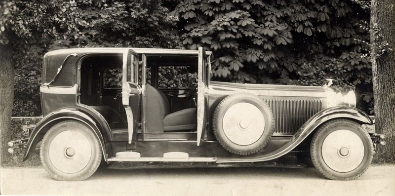 Hispano carrossée par Pourtout, vers 1930